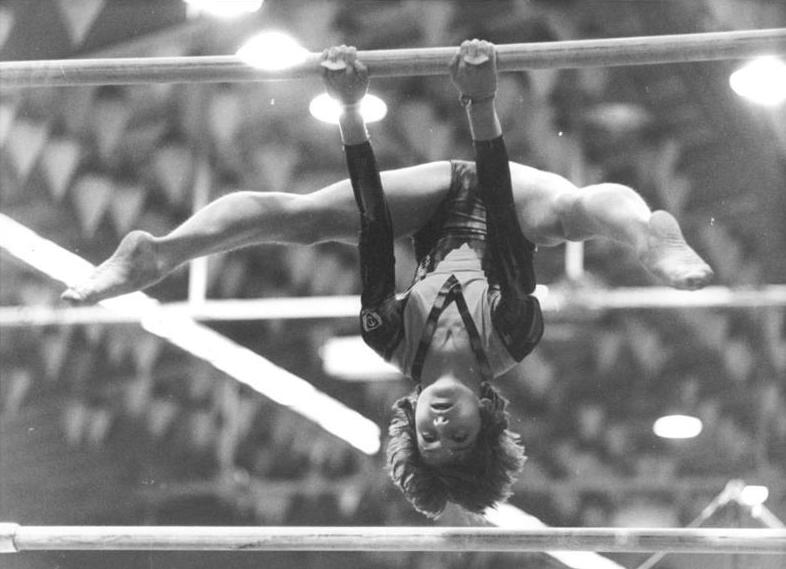 Regina Grabolle ADN-ZB Mittelstädt 3.10.79 Schwedt: 31. DDR-Turnmeisterschaften - Regina Grabolle, die bereits nach der Pflicht führte, zeigte am Stufenbarren (2.10.79) eine tadelsfreie Übung und erhielt die Höchstnote 10,00. Im Achtkampf behauptete die Berliner Dynamosportlerin einen 0,05 Punkte-Vorsprung.